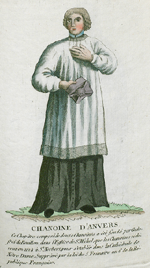 Collection de costumes de tous les ordres monastiques, supprimés à differentes époques, dans la ci-devant Belgique, Bruxelles, Philippe Joseph Maillart et sœur, 1811